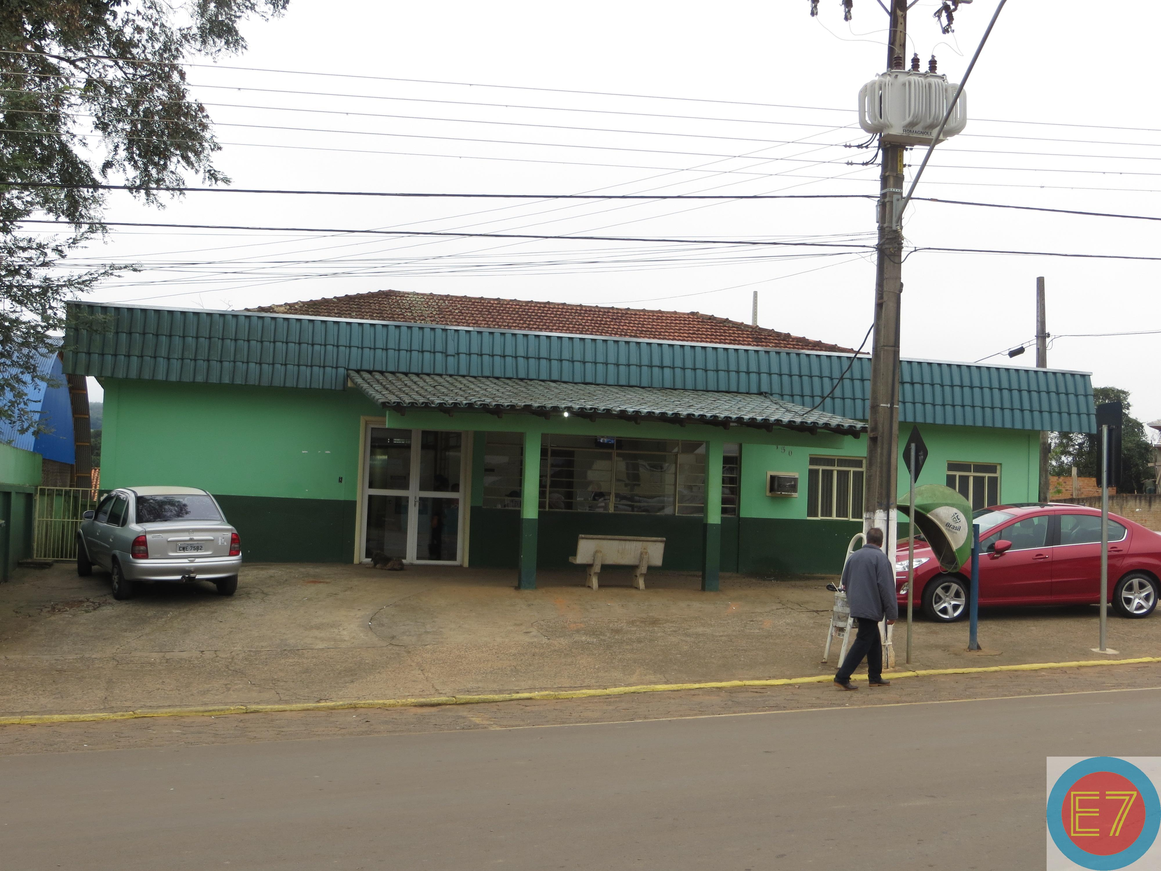 Hospital Municipal de Curiúva, Estado do Paraná, Brasil.